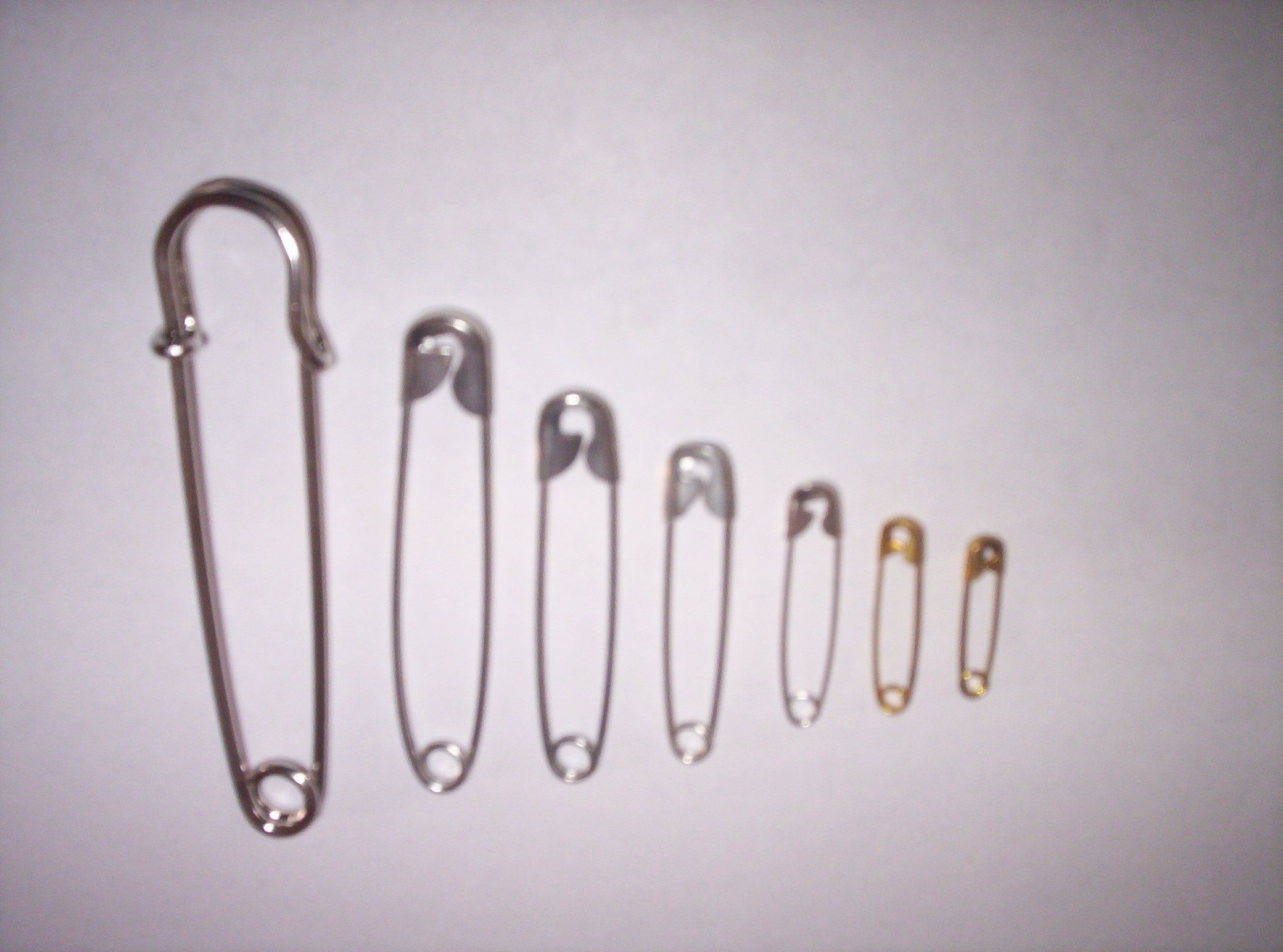 Safetypin03.jpg